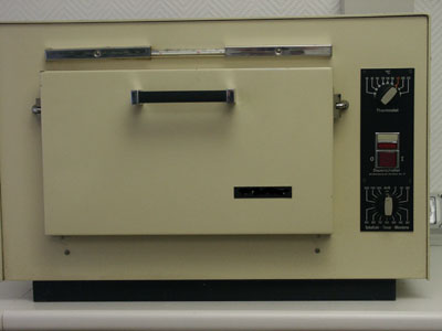 eigen foto